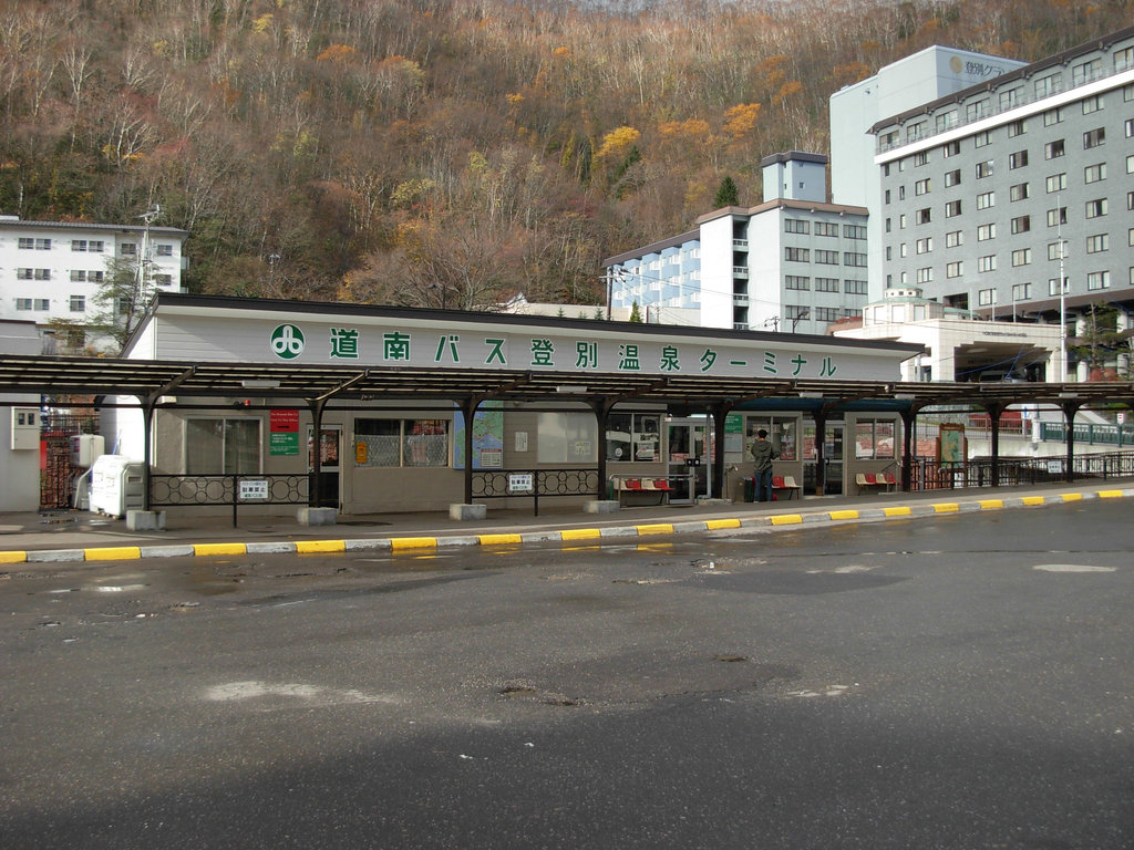 Donan bus Noboribetsu spa bus terminal(Noboribetsu) 道南バス 登別温泉ターミナル